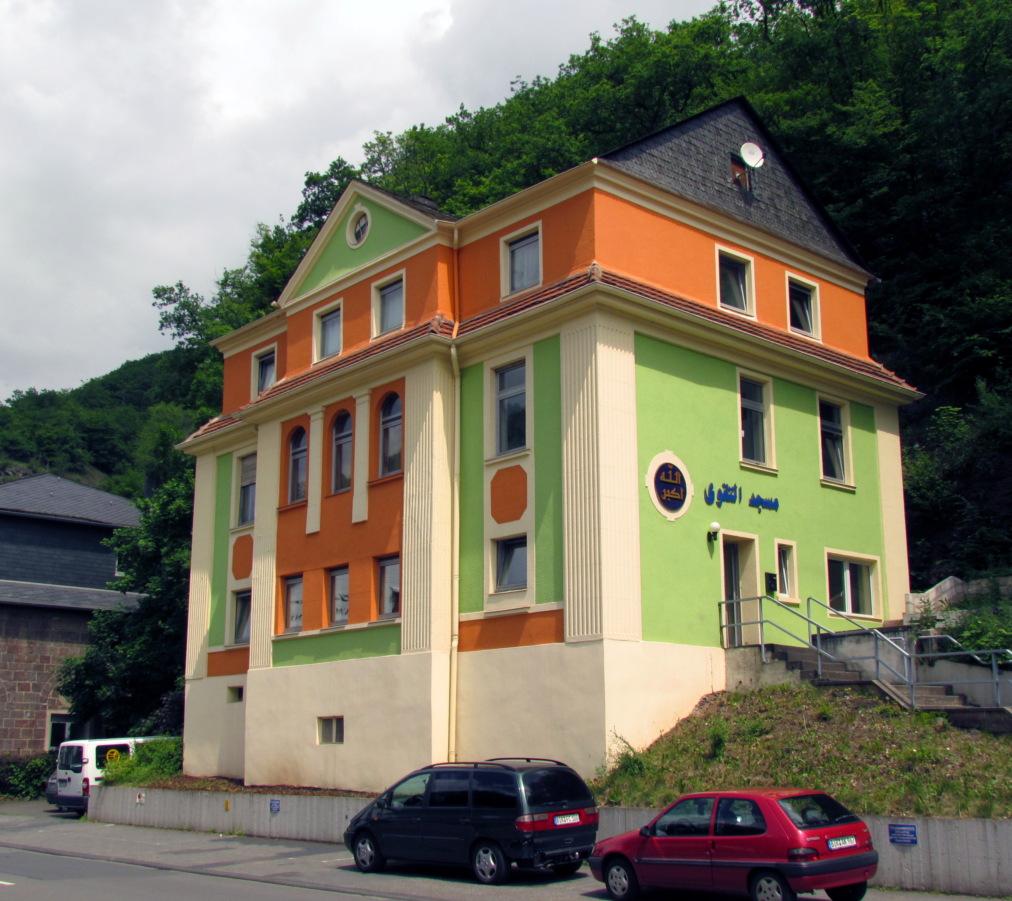 Bildinhalt: Farbiges Haus in Idar-Oberstein Aufnahmeort: Idar-Oberstein, Deutschland